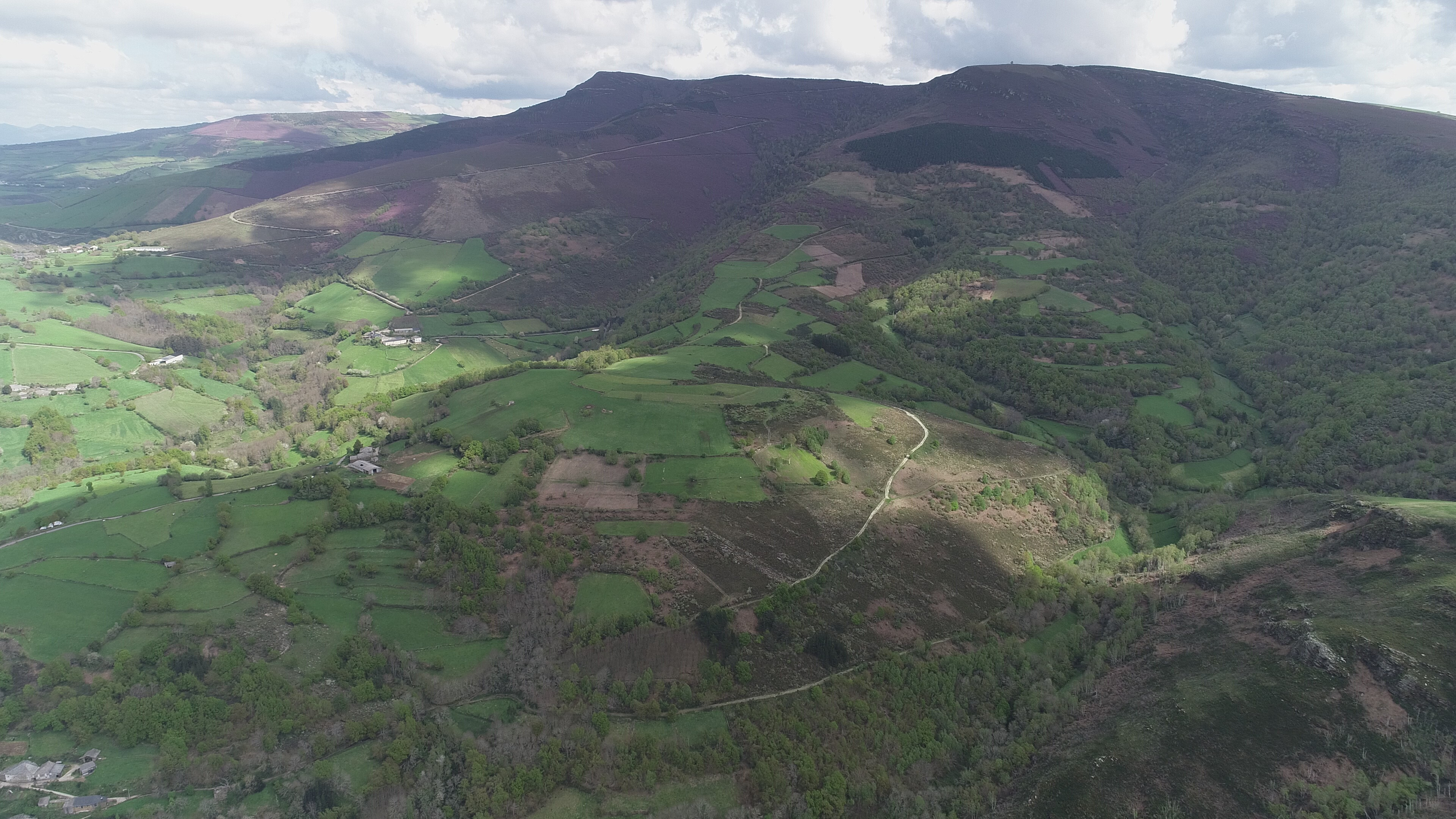 Al fondo a la derecha, se puede divisar el punto más elevado de la sierra, el Pico Oribio con 1.447 m y el Alto de Torrentes con 1.376 m (izquierda), en el que se encuentra la torre de vigilancia forestal perteneciente al distrito forestal IX.